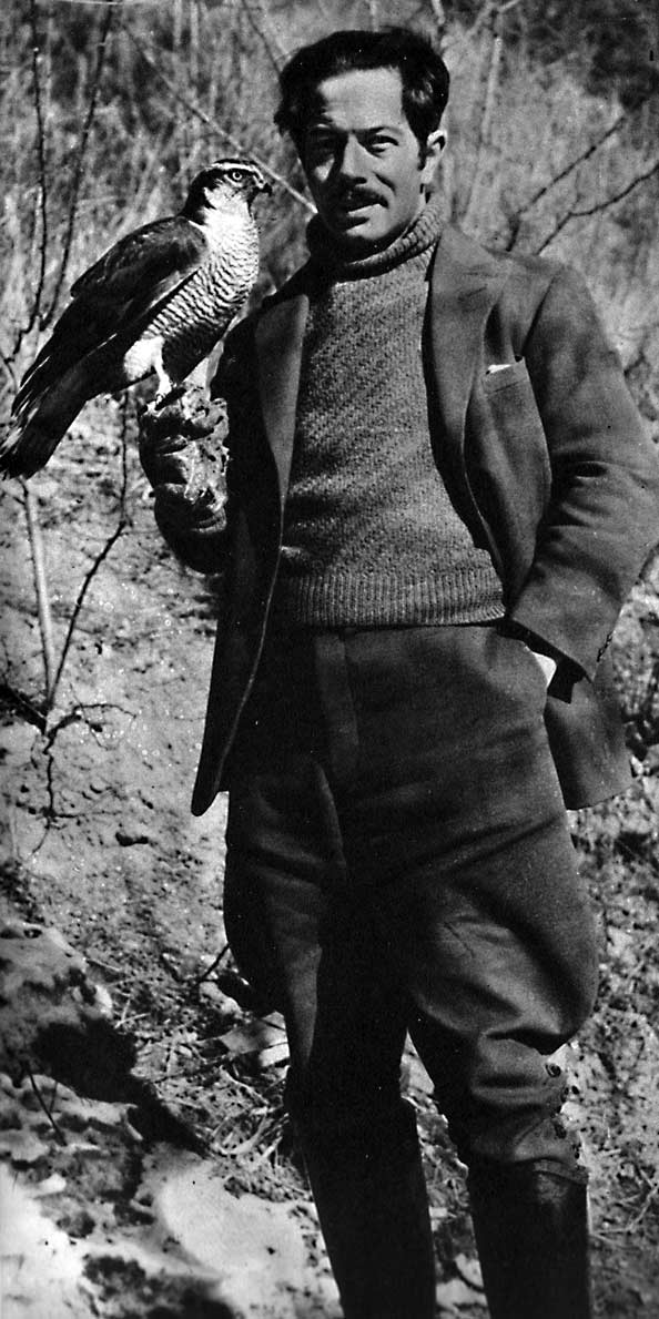 Sten Bergman i Korea, iförd jaktmundering med en tam duvhök på armen.